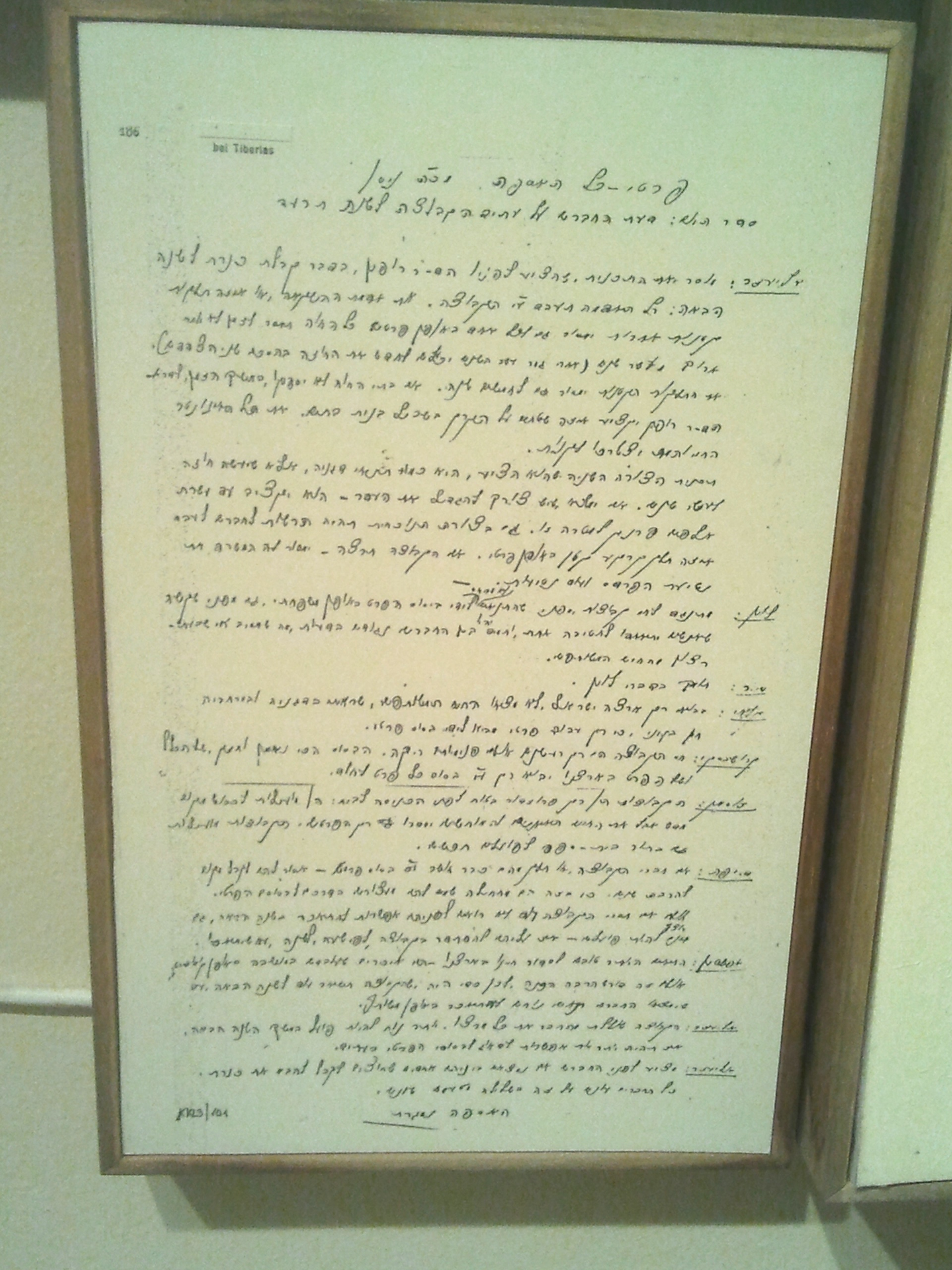 .מוזיאון לתולדות כנרת. הבית נבנה בשנת 1929 ונקרא הבית האמצעי בראש הגבעה לאחר שיפוץ נפתח בשנת 1989 מחדש ומשמש כמוזיאון קבוצת כנרת והארכיון שלה פרטיכל אסיפה על עתיד הקבוצה משנת תרע"ד 1914-1913